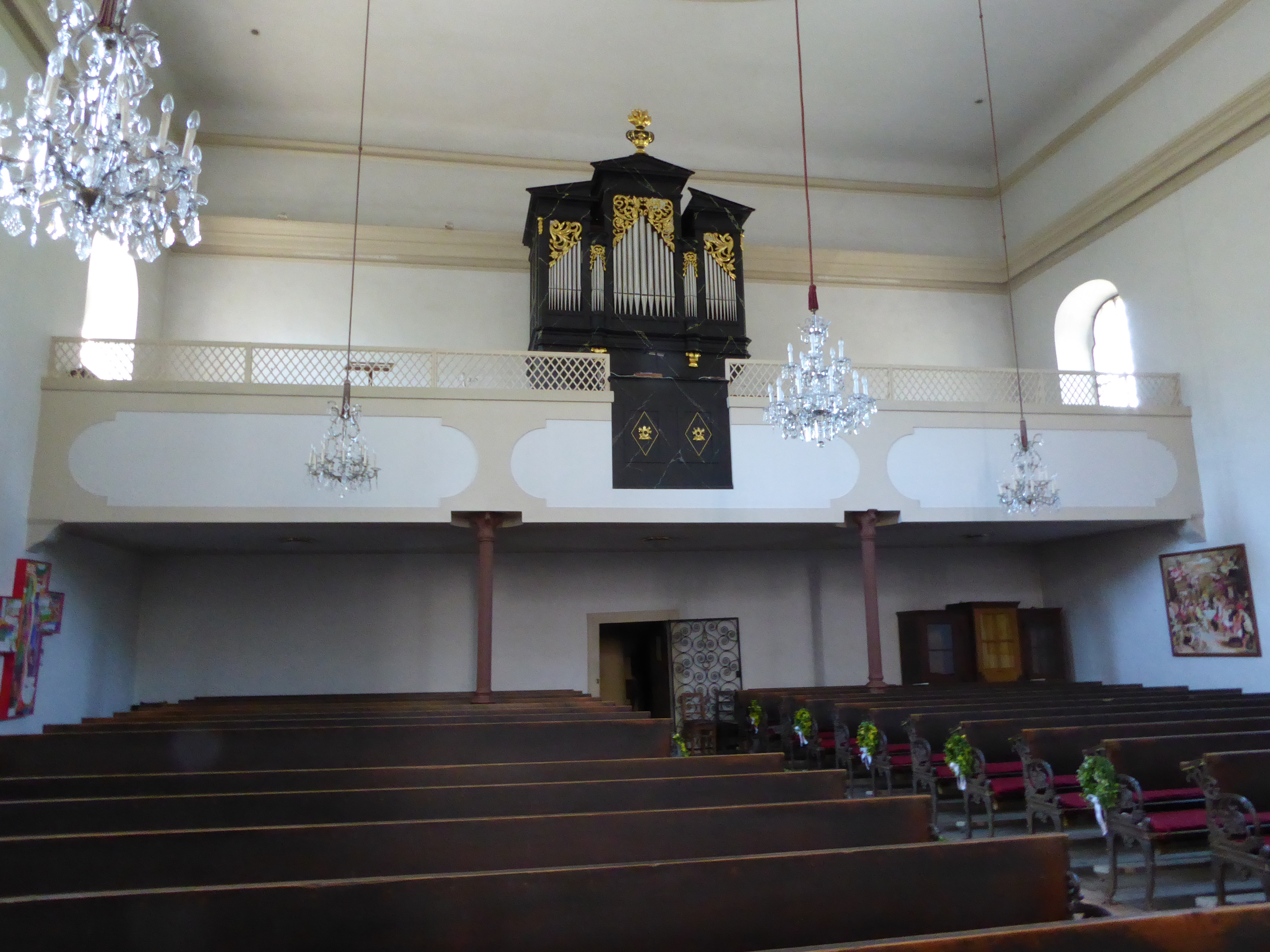 Pfarrkirche Niederranna, Mühldorf, Niederösterreich - Orgelempore (1852) auf Gusseisenstützen